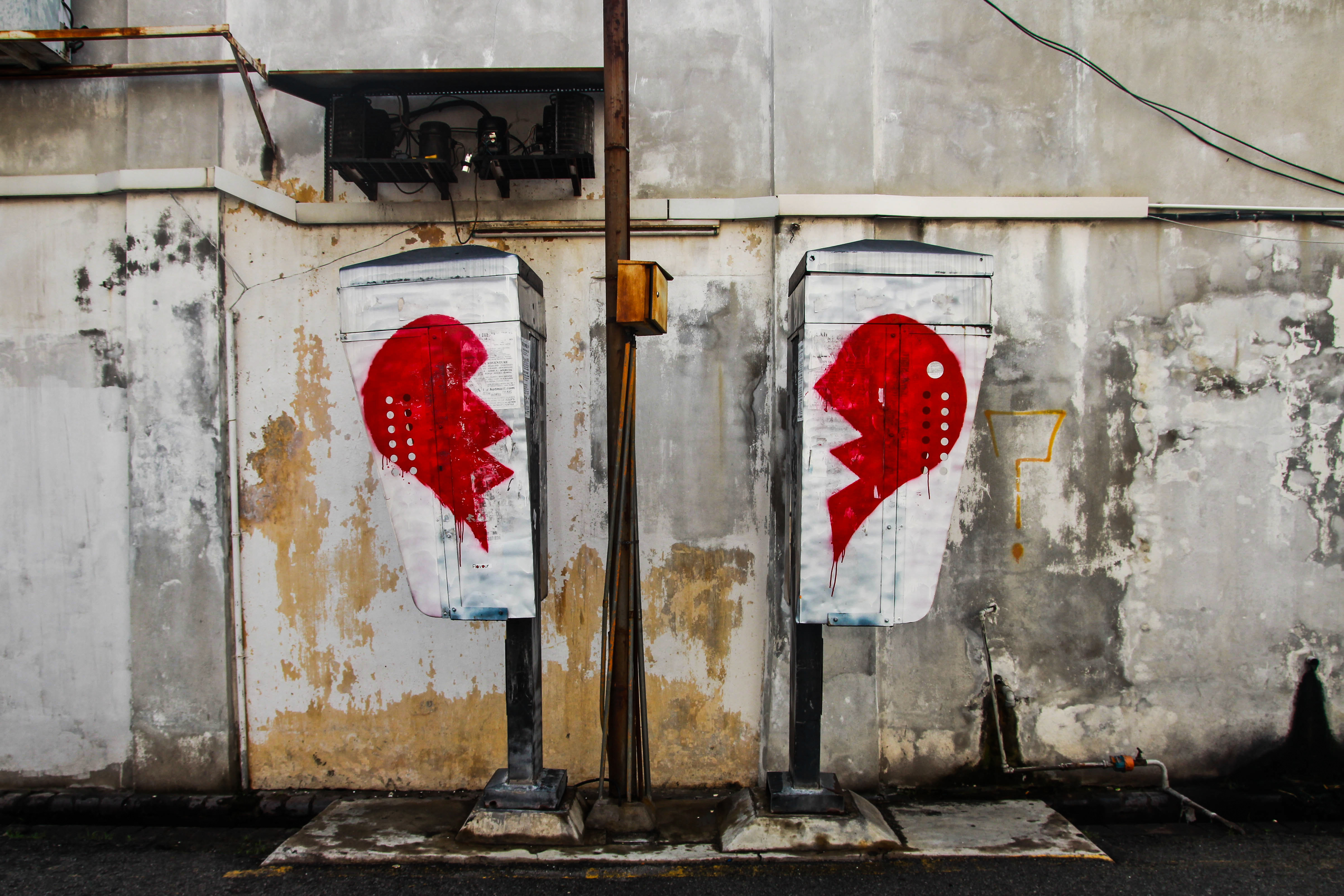 Streetart in der Love Lane in Georgetown